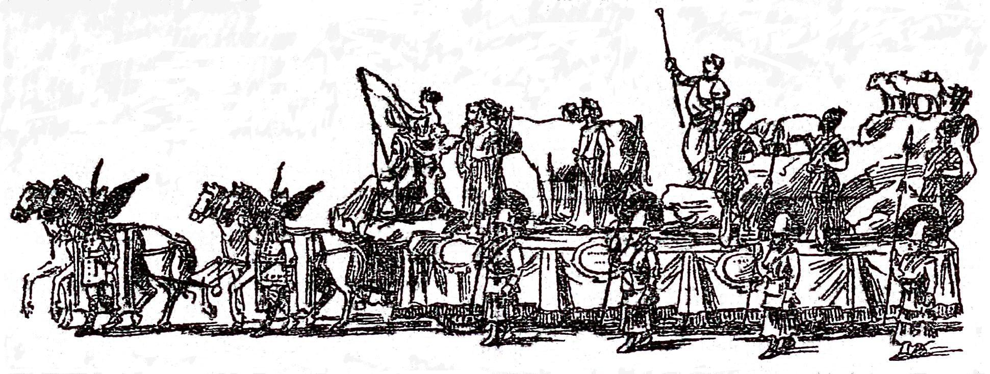 Char du Bœuf Gras 1900 qui a défilé le 25 février 1900 à Paris.